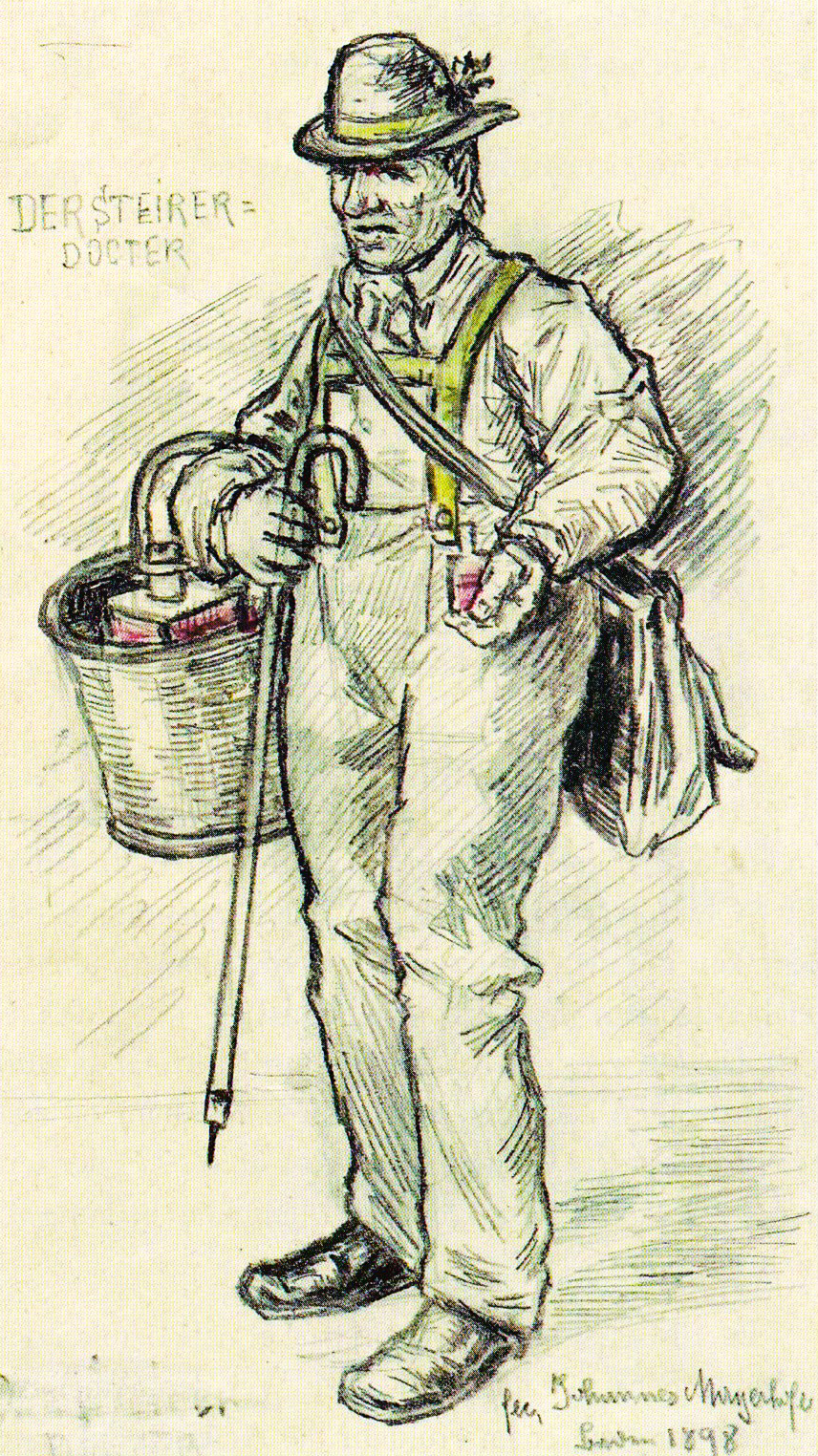 Der Steirer Docter alias „Amasdocter“, Zeichnung von Johannes Mayerhofer